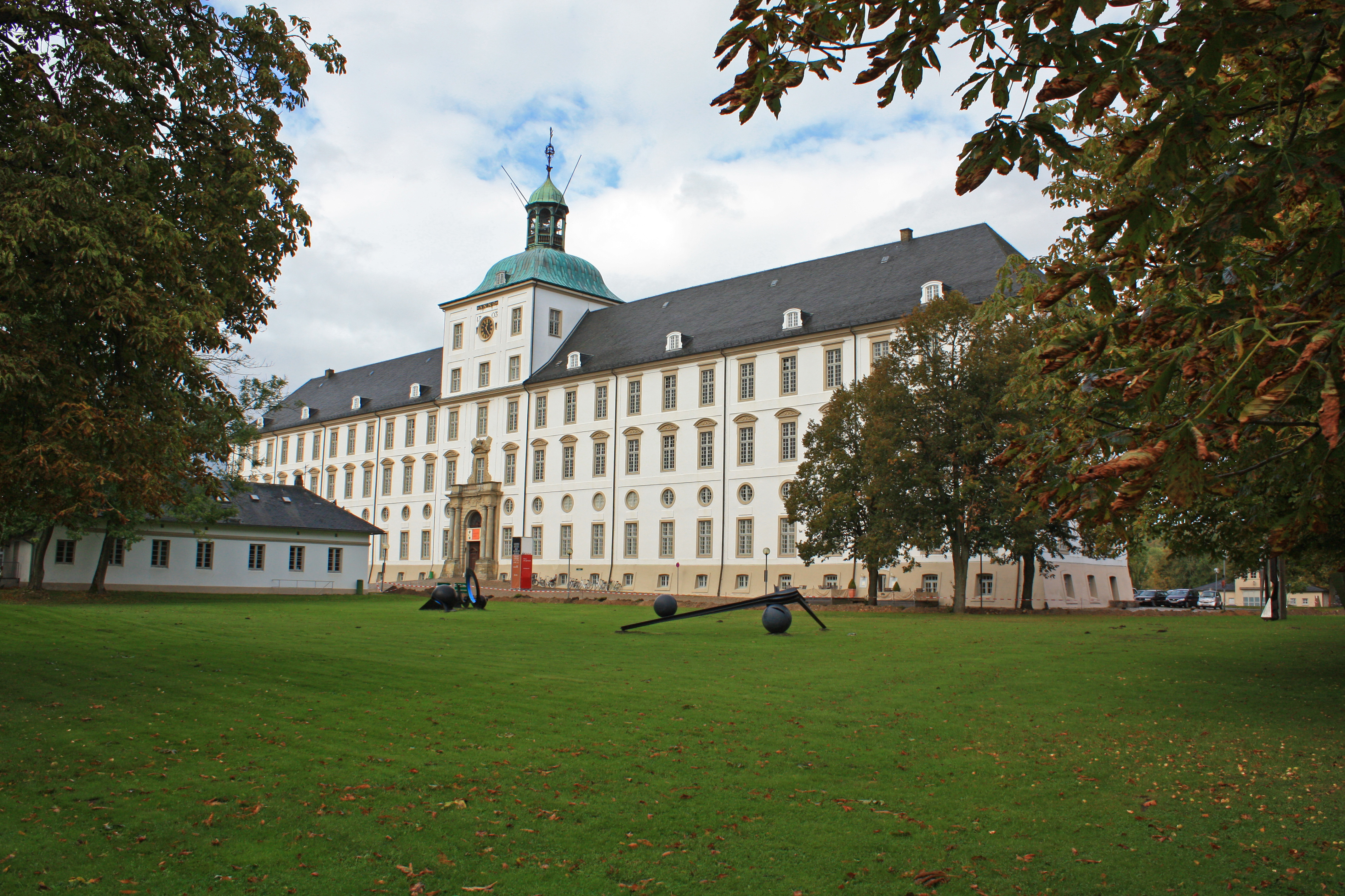 Schloss Gottorf. Schlossinsel, Schleswig. No 50-1